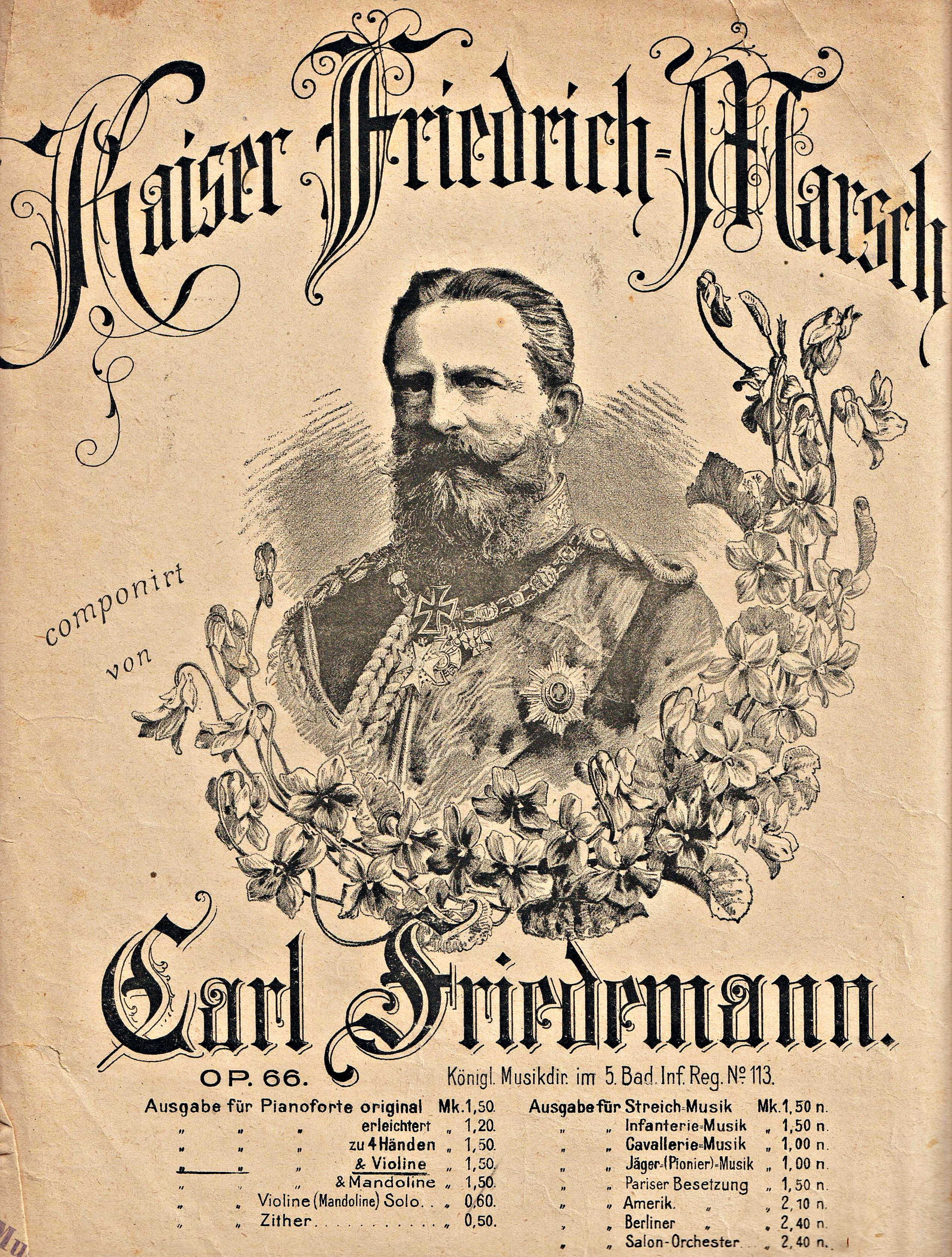 Titelblatt Kaiser Friedrich Marsch von Carl Friedemann, 1910 (eigener Scan von altem Notenblatt)